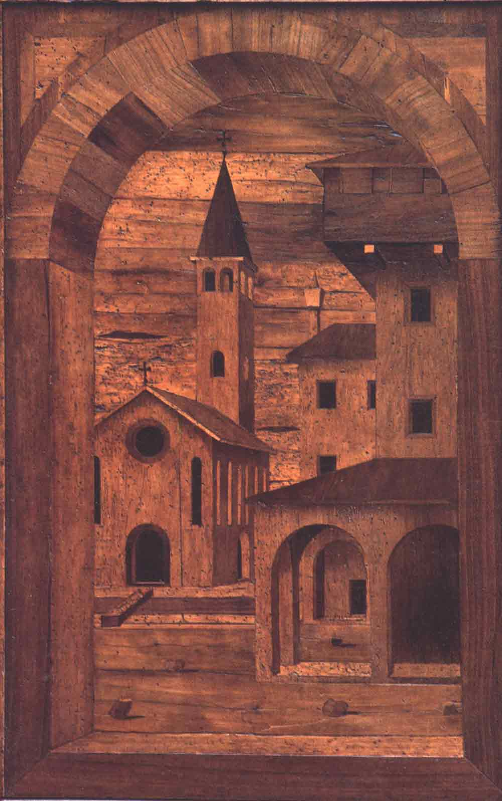 Tarsia prospettica dell'ordine superiore del Coro della Chiesa di Sant'Andrea a Ferrara, attribuita a Pier Antonio degli Abbati alla fine del XV secolo